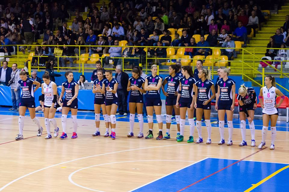 Vedi titolo